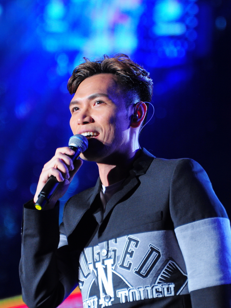 楊宗緯 2014.04.05大甲媽祖之光演唱會